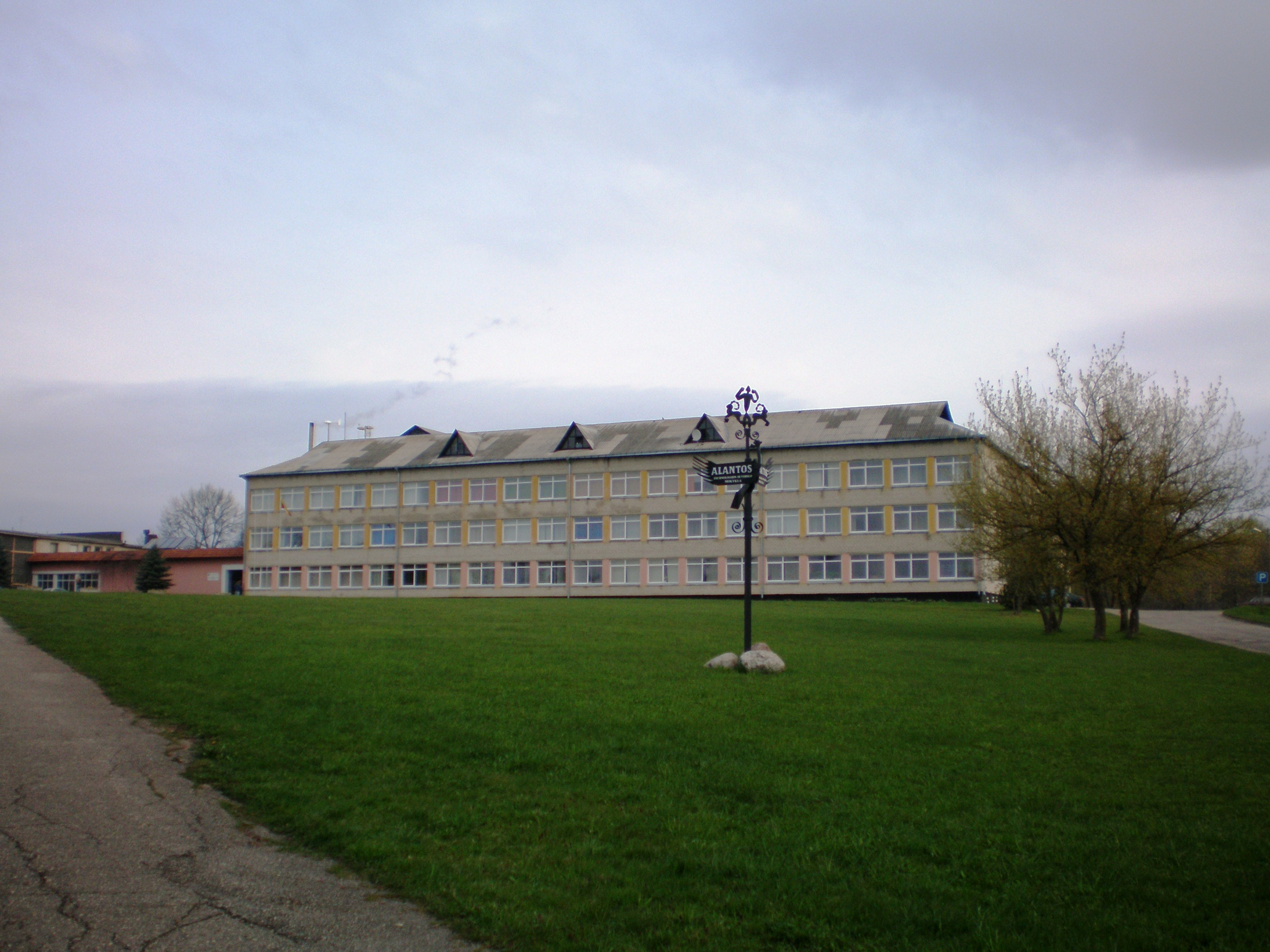 Altantos technologijos ir verslo mokykla Naujasodyje, Molėtų raj. 2007.05.04 Foto: Hugo.arg